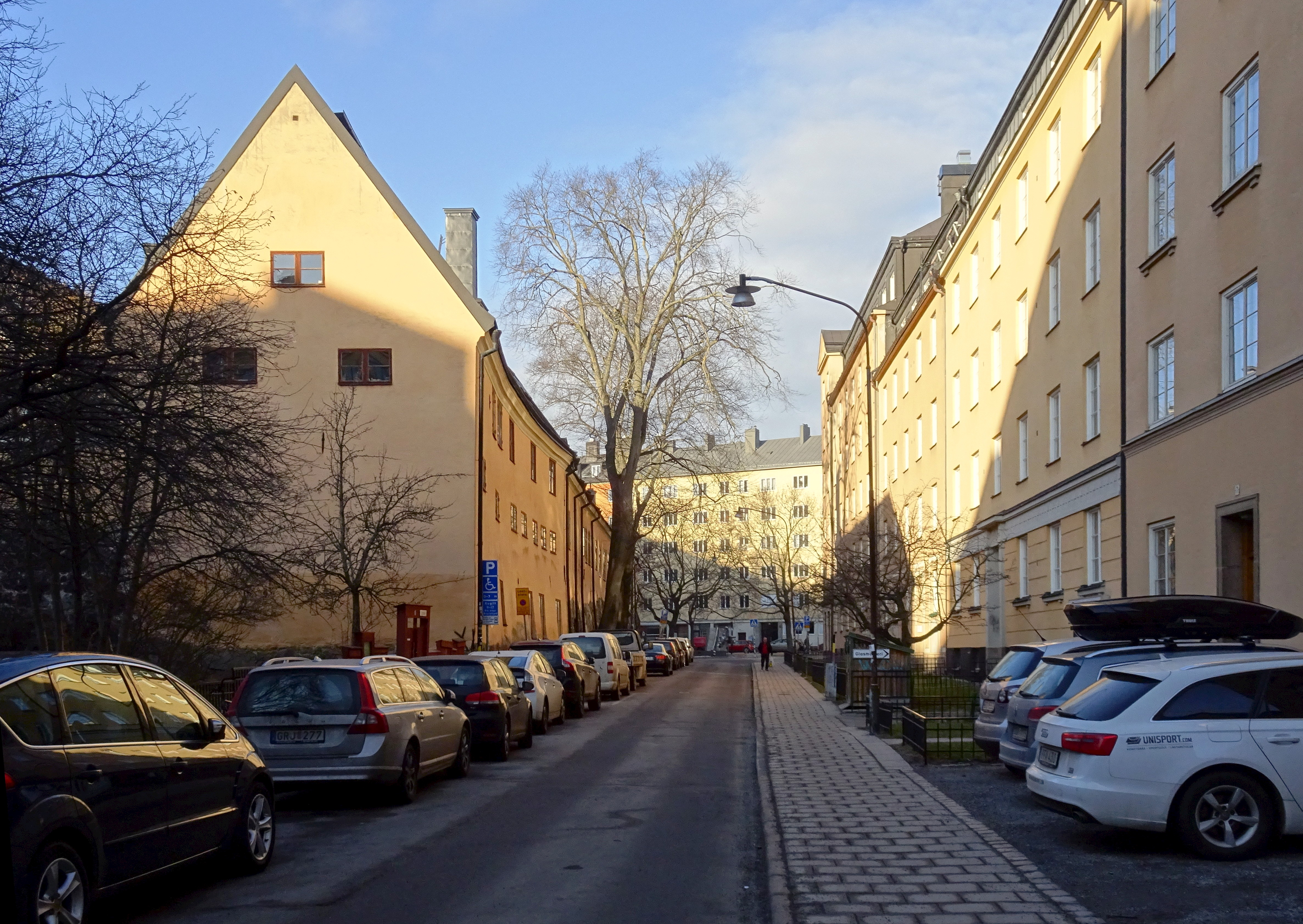 Brännerigatan sedd från Gotlandsgatan, kvarteret Tegen till vänster